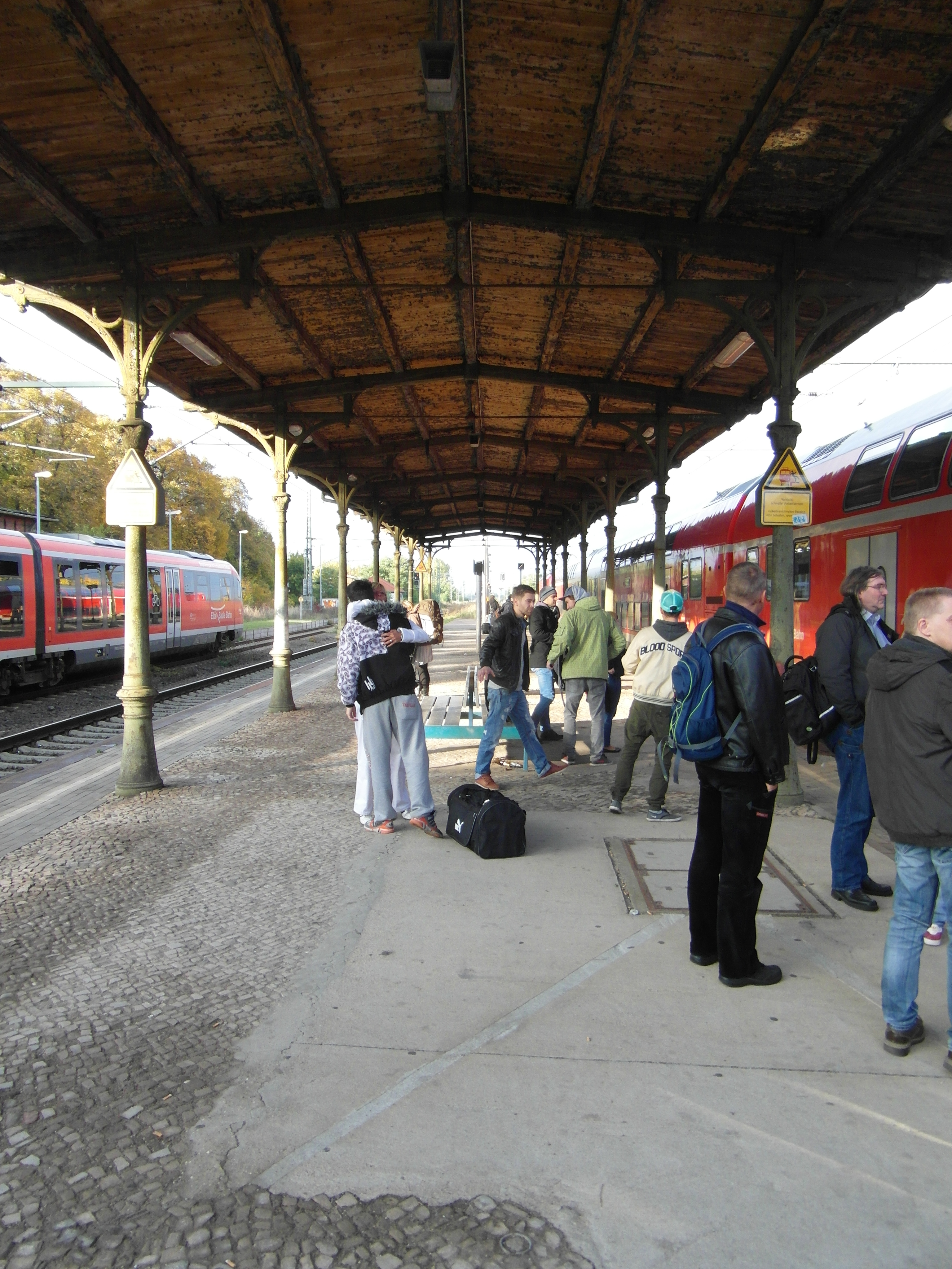 Im Salzlandkreis in Sachsen-Anhalt